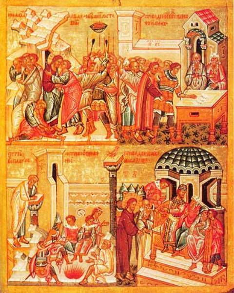 Целование Иуды. Христос перед Каиафой и Анной. Отречение апостола Петра. Приведение Христа на судилище к Пилату.. Конец XV - начало XVI в. Четырехчастная икона, Новгород